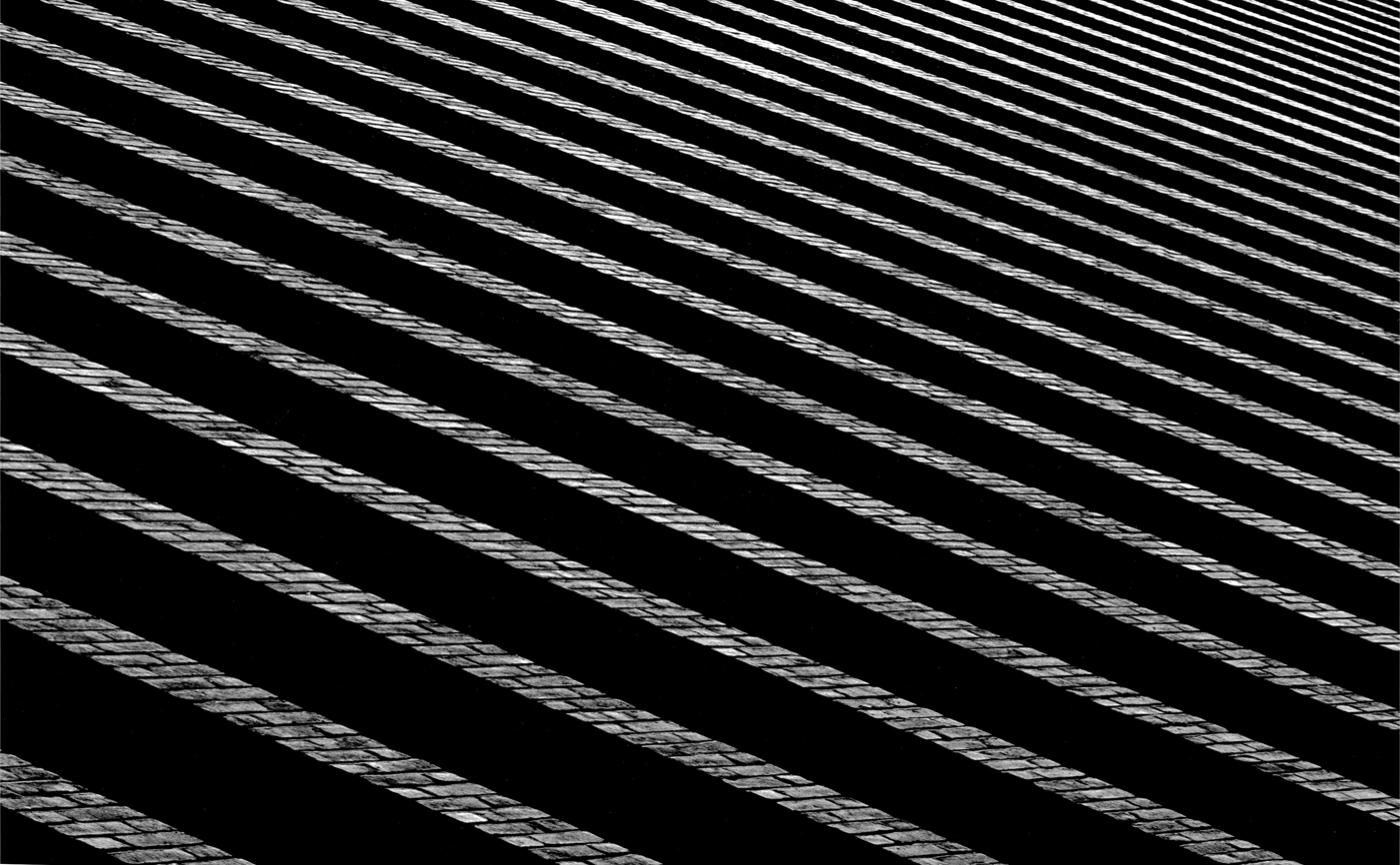 Symmetriskt murade tegelväggar. Syd Kraft Malmö.